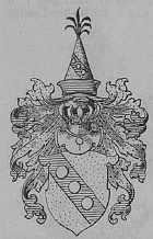 Wappen der Familie Bombast von Hohenheim. In Gold ein mit drei silbernen Kugeln belegter blauer Schrägbalken